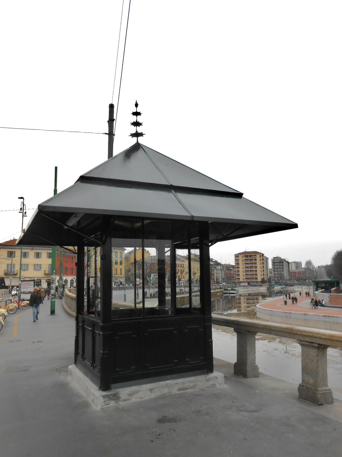 Edicola Radetzky al termine del restauro (marzo 2016)